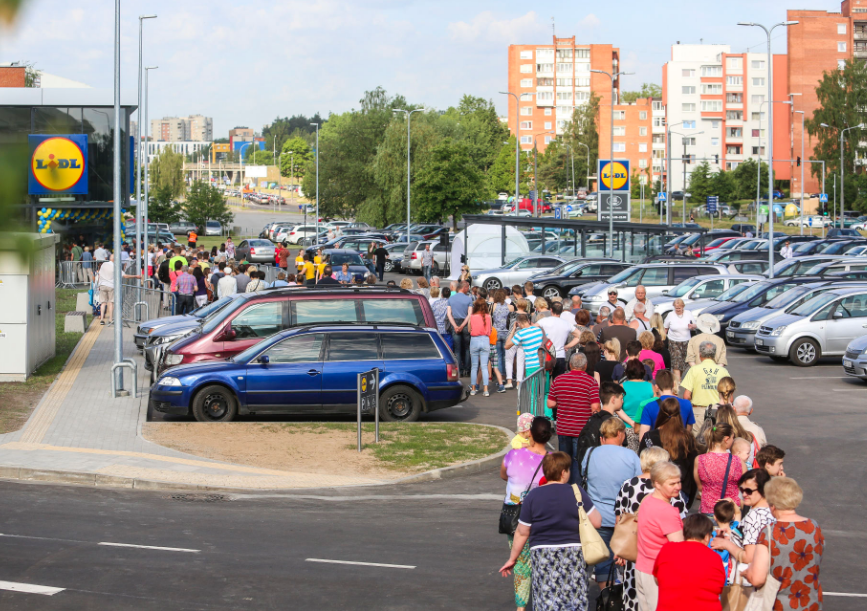 Lidl Vilnius opening weekend